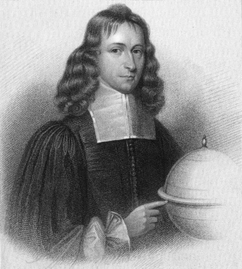 James Gregory